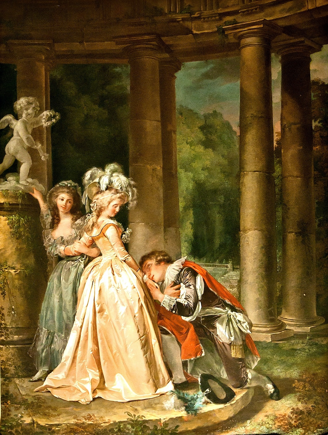 Louis-Roland Trinquesse (1745/1746–1799/1800): Le serment à l'amour (Schwur an Amor), 1786. Öl auf Leinwand, 131 x 98 cm. Musée des Beaux-Arts de Dijon.